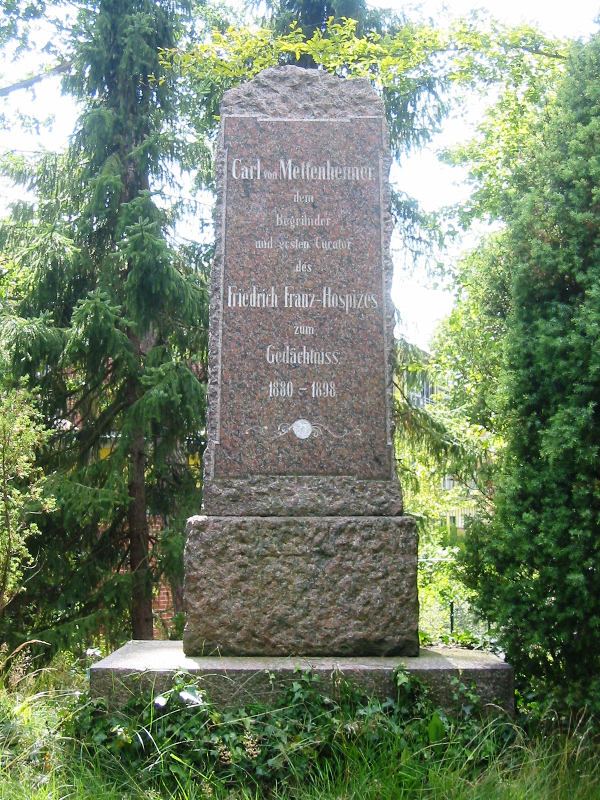 Gedenkstein für den Gründer des ersten Kindersanatoriums an der Ostsee, Dr. Carl von Mettenheimer auf dem Gelände des Sanatoriums, heute eine Kinderklinik "Am Tannenhof" in Graal-Müritz